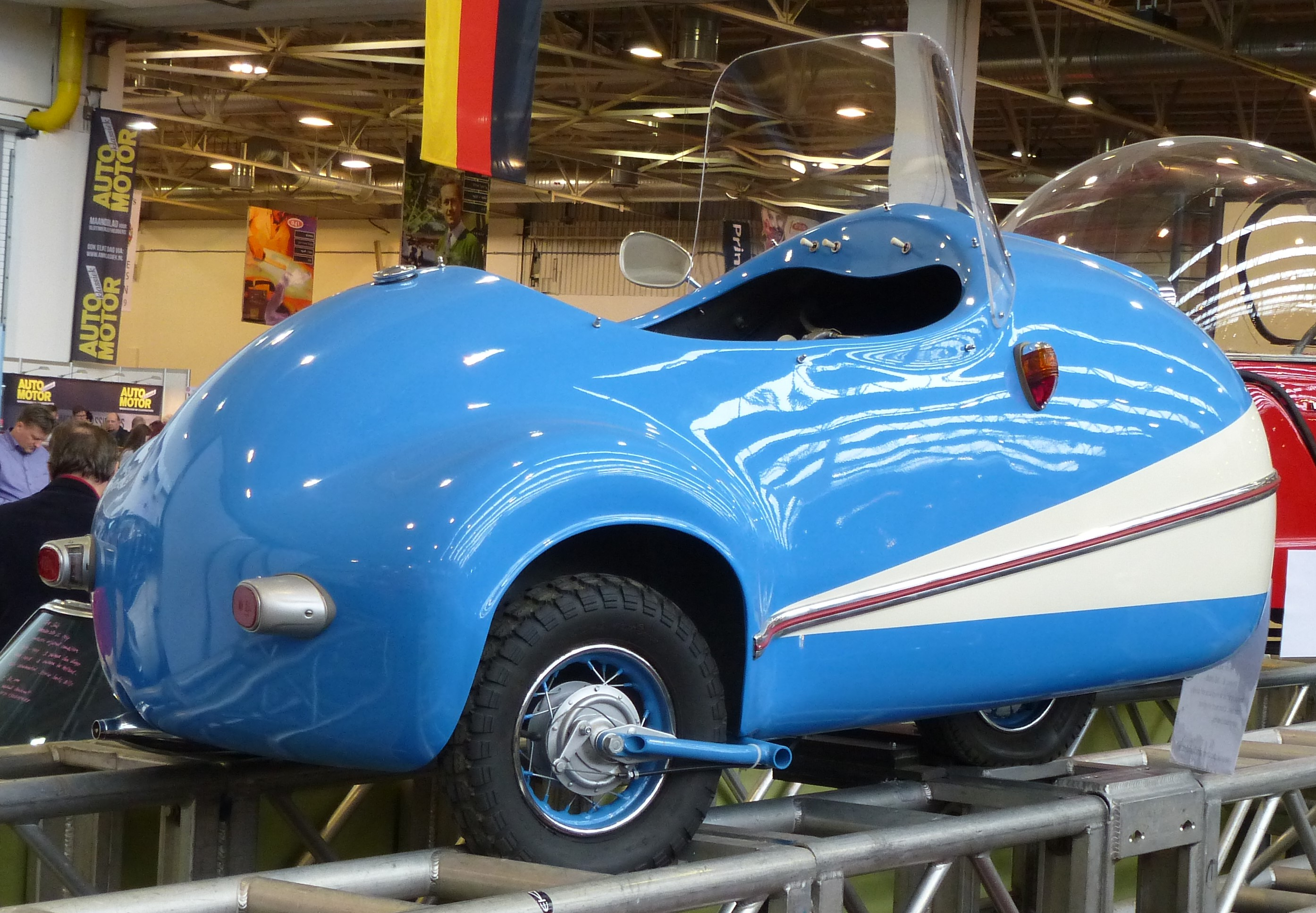 Mopetta GmbH Mopetta Nachbau von Andy Carter